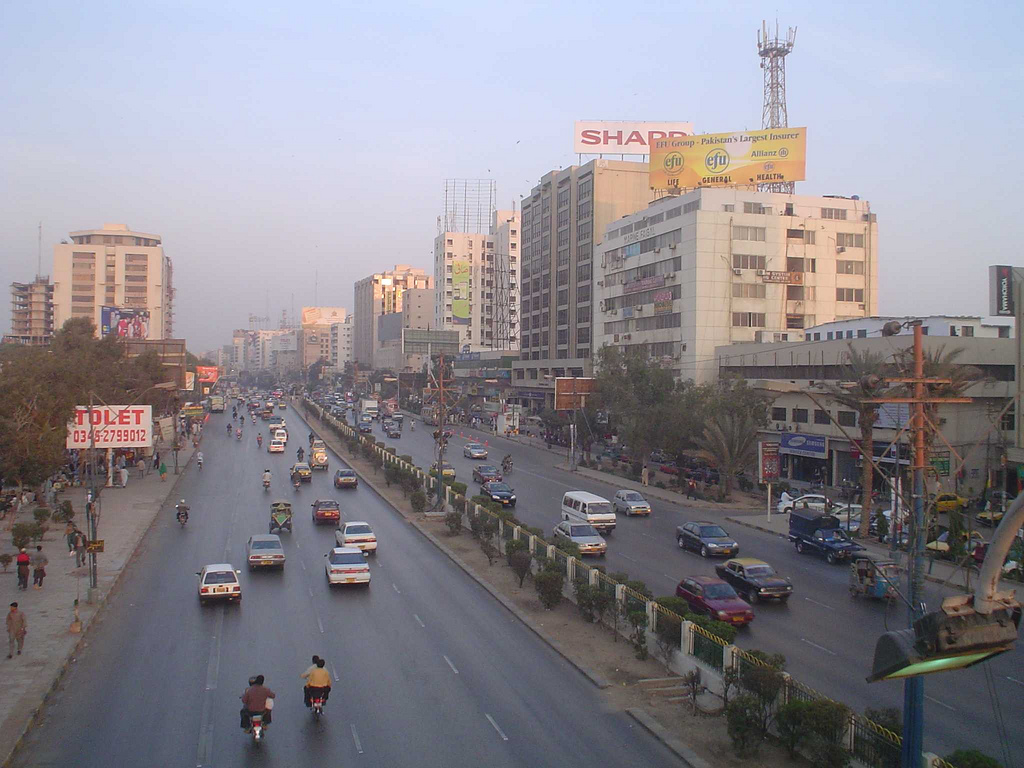 Karachi street